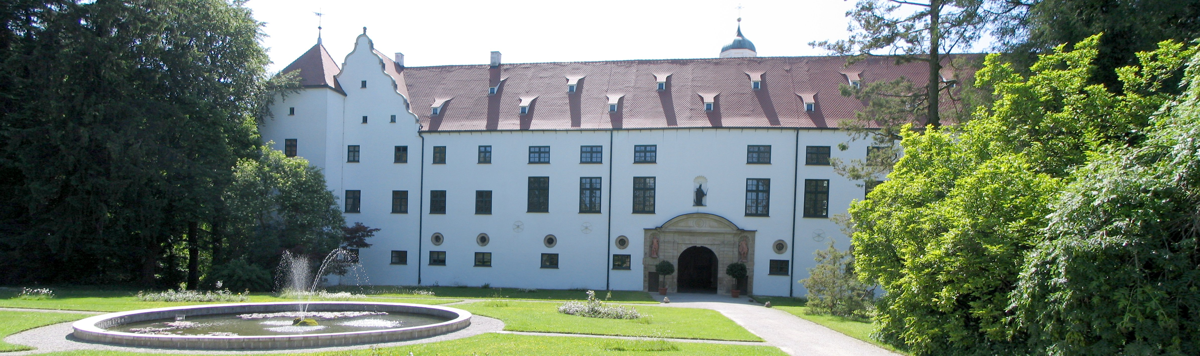 Schloss Kirchheim/Schwaben Date: June 2006 Camera: Canon Powershot S1